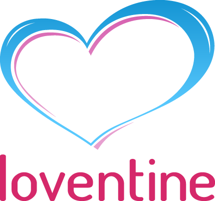 logo loventine transparente